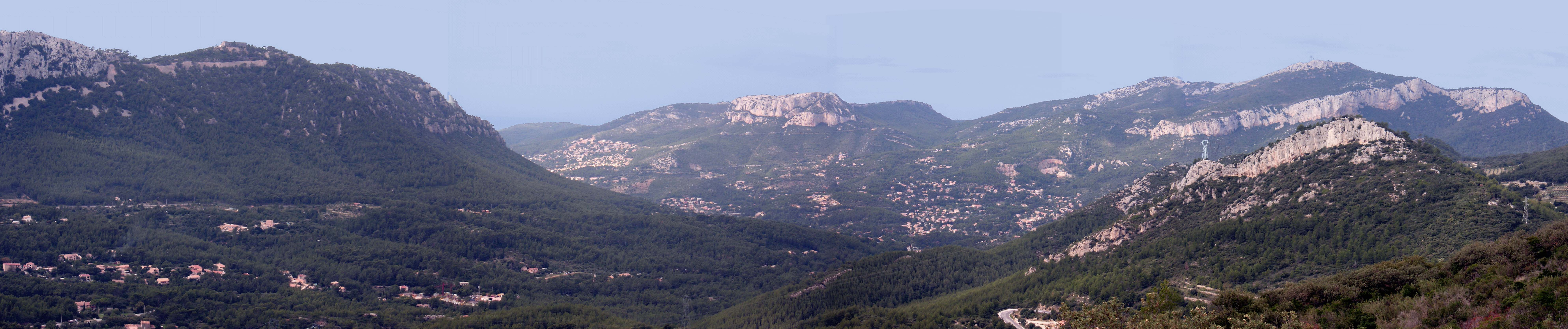 Vue arrière de la ville de Toulon (France, Var), avec le Revest.